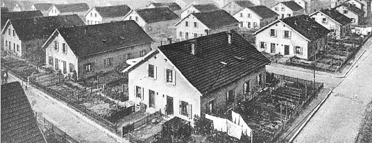 Kolonie Hemshof 1880This is a photograph of an architectural monument.It is on the list of cultural monuments of Ludwigshafen